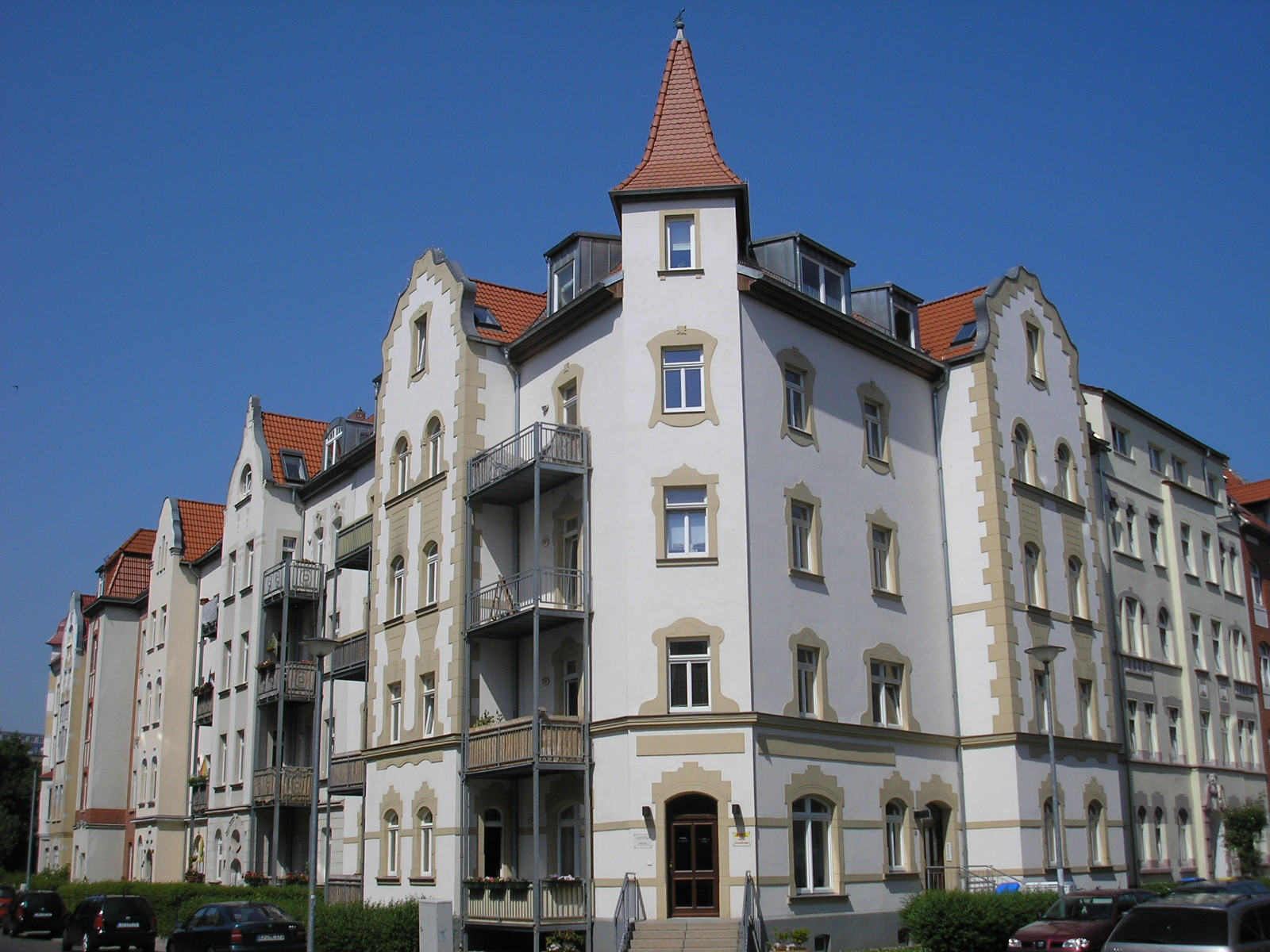 Storchmühlenweg/Ecke Schobersmühlenweg in Erfurt.